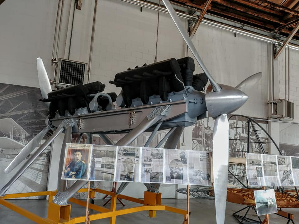 Motore s 55 esposto a Volandia